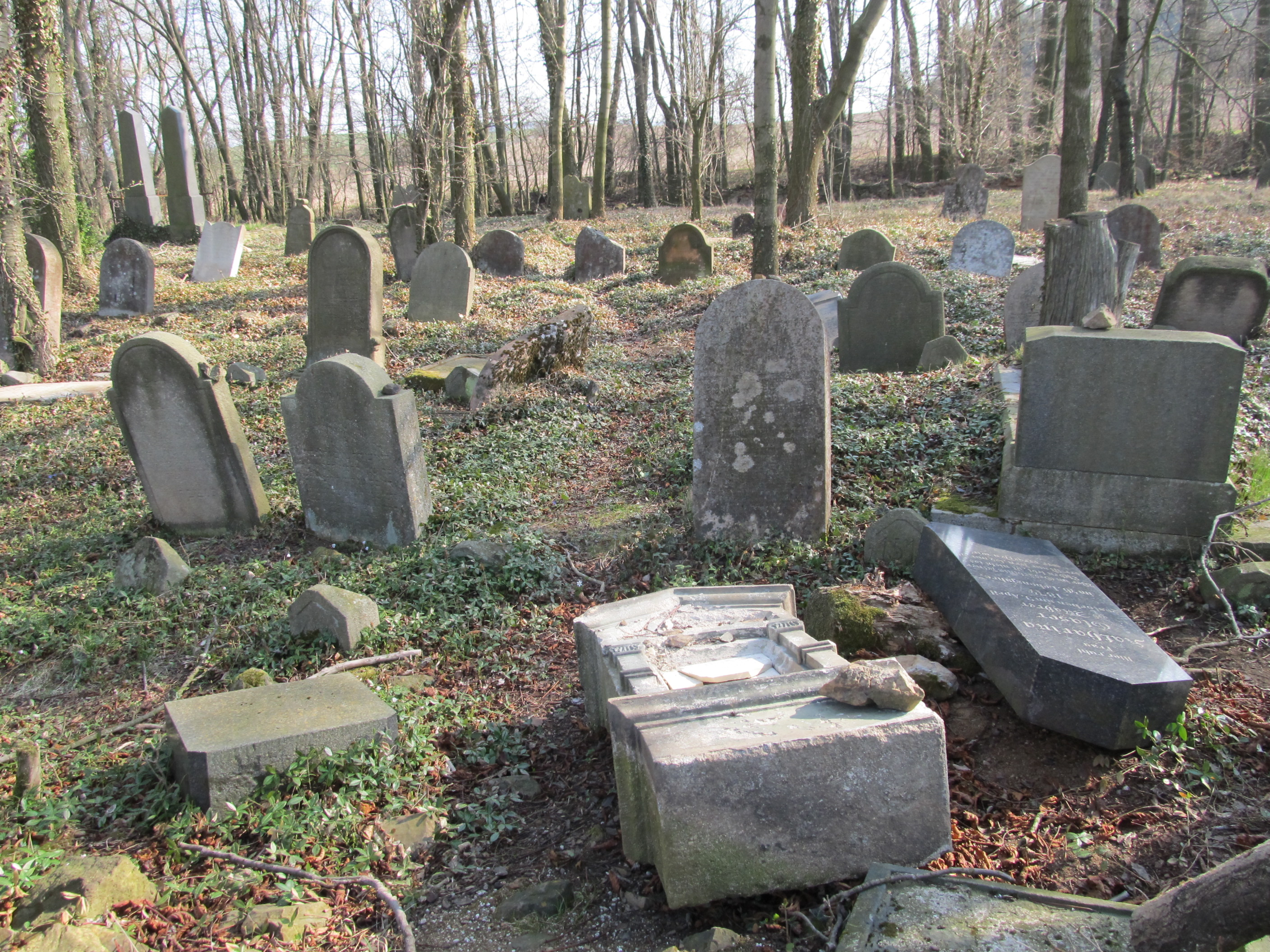 Terešov ŽH 08